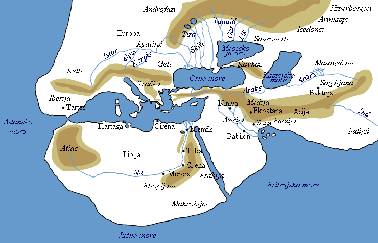 Rekonstruirana karta svijeta prema Herodotu (5. st. pr. Kr.)